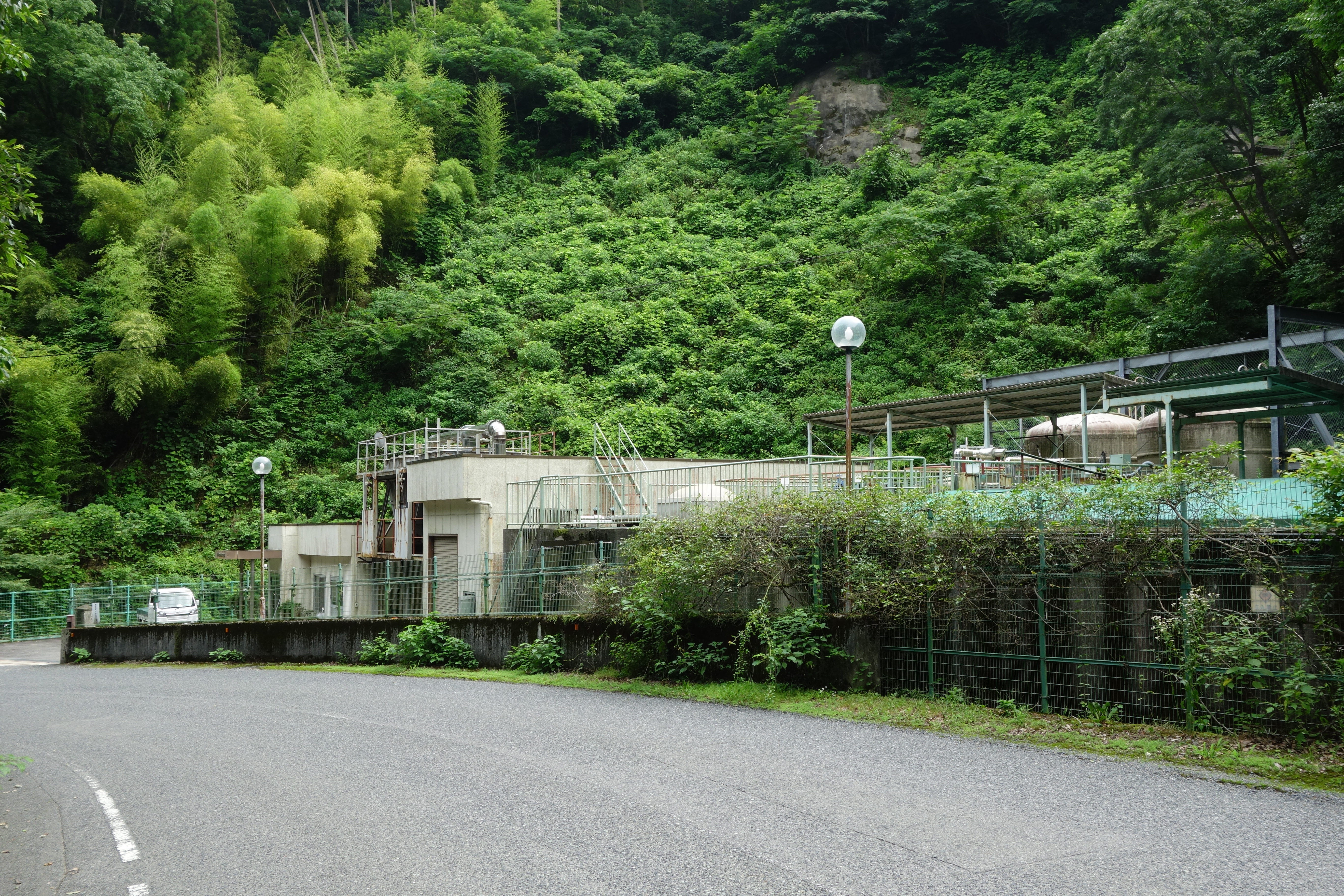 広島県府中市の出口川湧水処理場